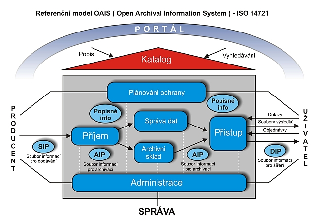 Schema OAIS v češtině